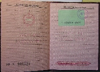 Keményfedeles személyi igazolványba utólag beragasztott zöld cédula a személyi számmal, 1978